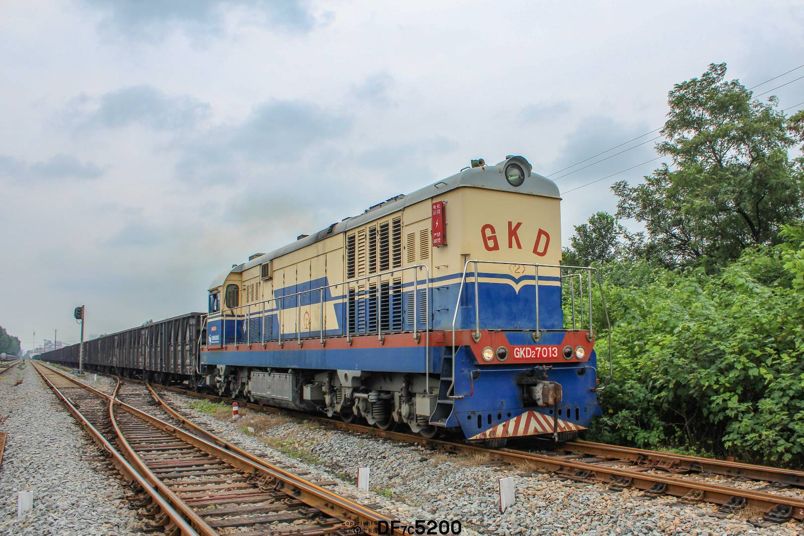 淮化集团购买的戚墅堰机车工厂生产的GKD2